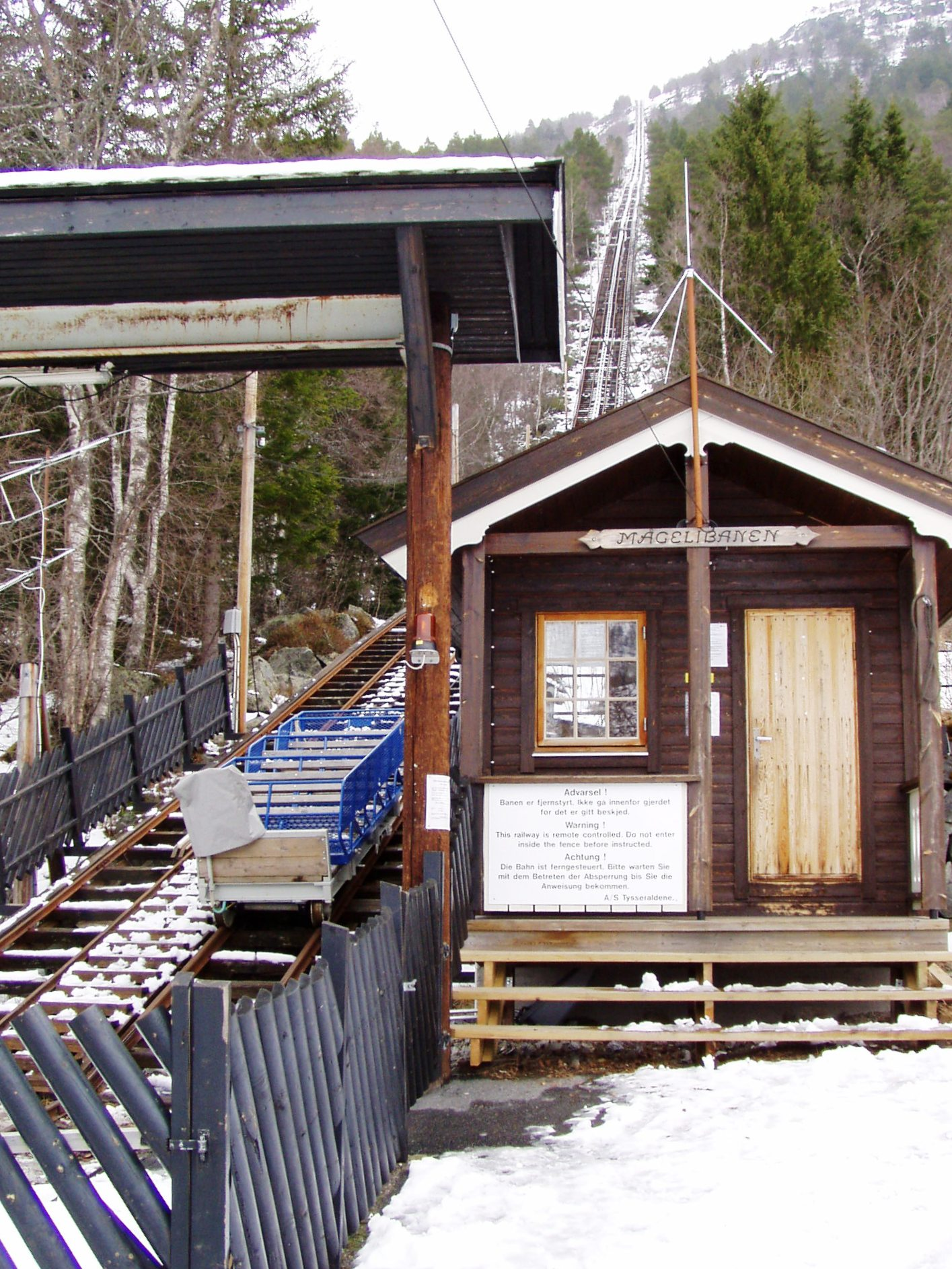 Mågelibanen